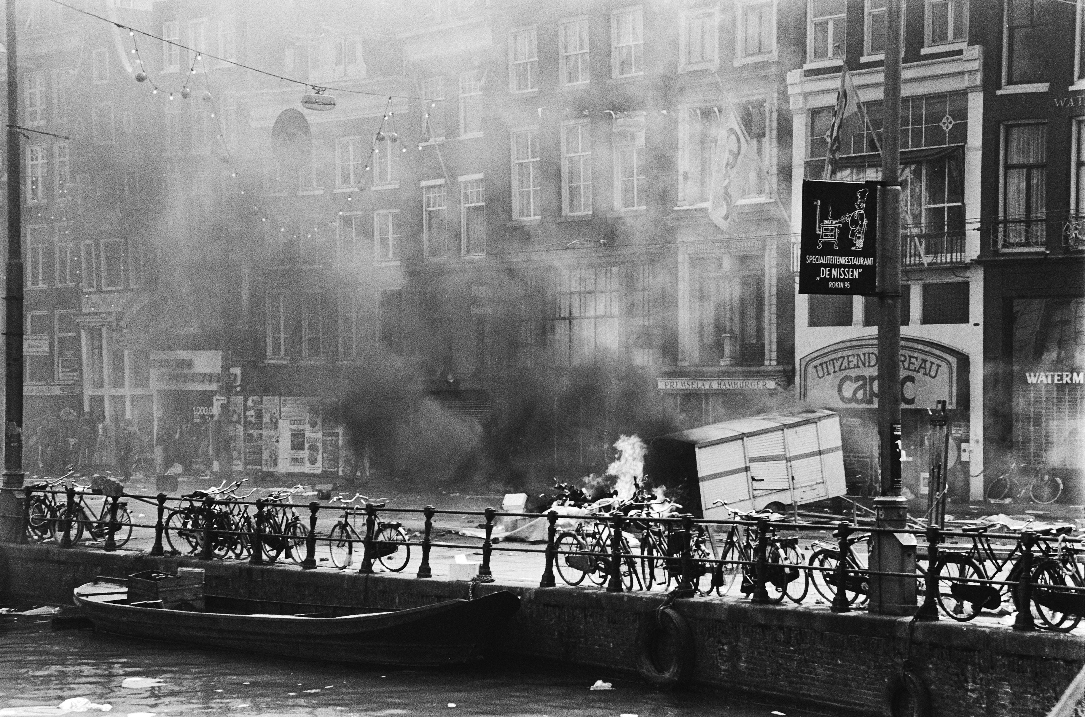 Collectie / Archief : Fotocollectie Anefo Reportage / Serie : [ onbekend ] Beschrijving : Troonswisseling 30 april , rellen tijdens Troonswisseling rookbom ontploft tussen leden Mobiele Eenheid Datum : 30 april 1980 Trefwoorden : RELLEN, ROOKBOMMEN, Troonswisselingen Fotograaf : Dijk, Hans van / Anefo Auteursrechthebbende : Nationaal Archief Materiaalsoort : Negatief (zwart/wit) Nummer archiefinventaris : bekijk toegang 2.24.01.05 Bestanddeelnummer : 930-8091